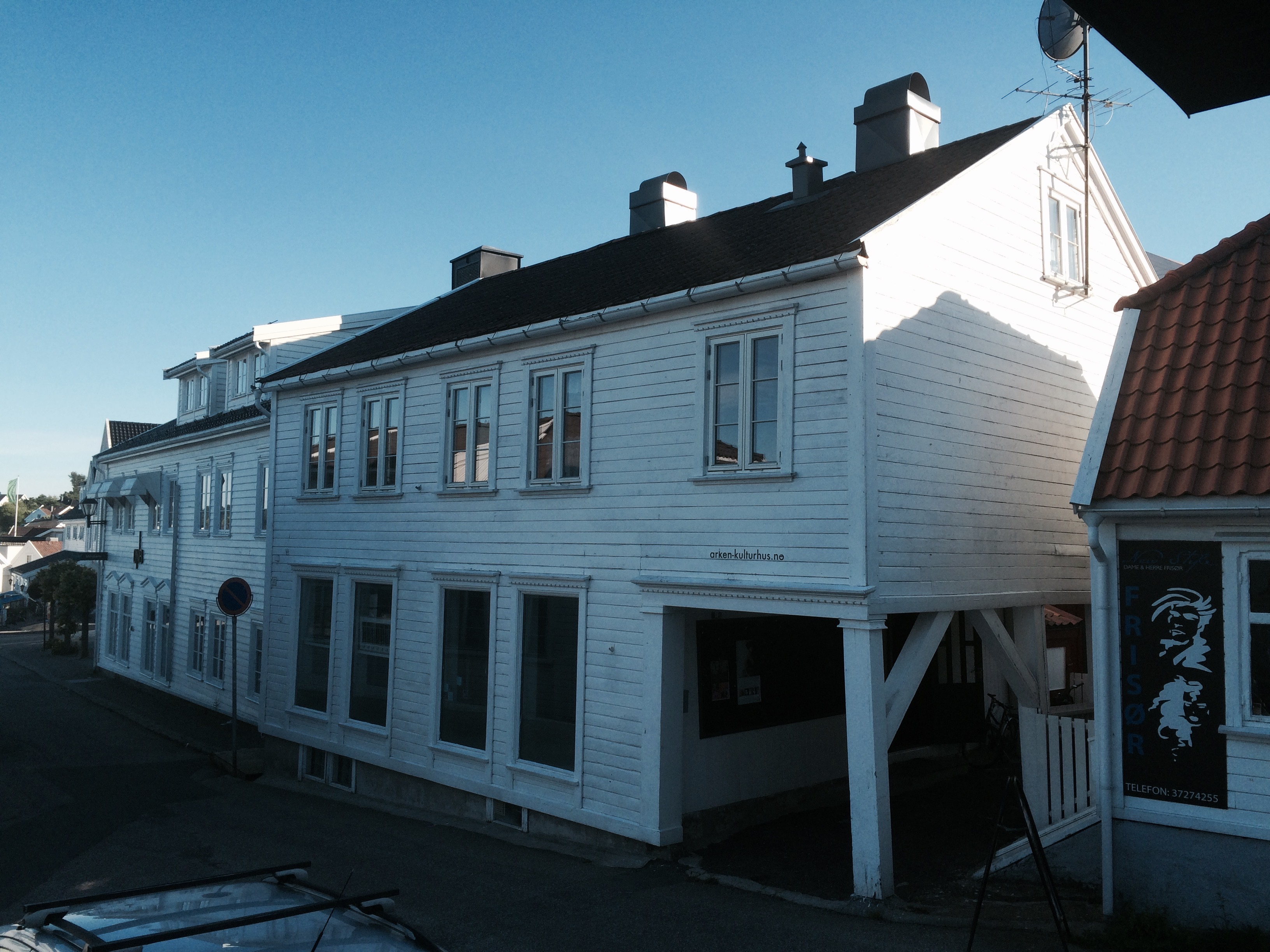 Arken kulturhus i Lillesand